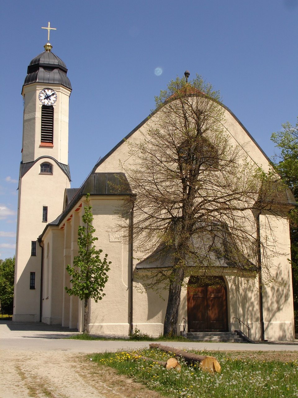 Jugendstilkirche in Dietelskirchen, Landkreis Landshut